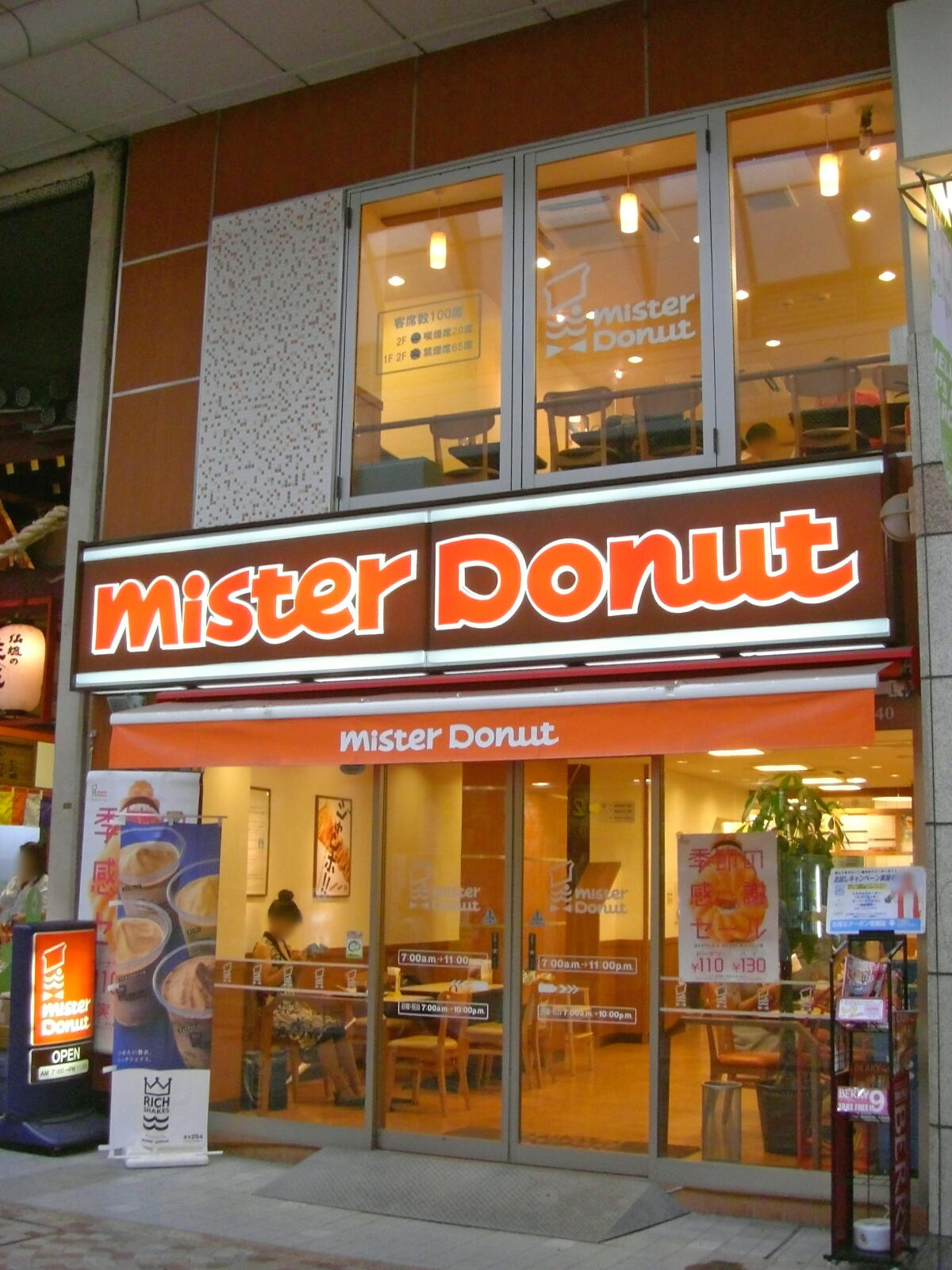 ミスタードーナツ仙台中央通りショップ